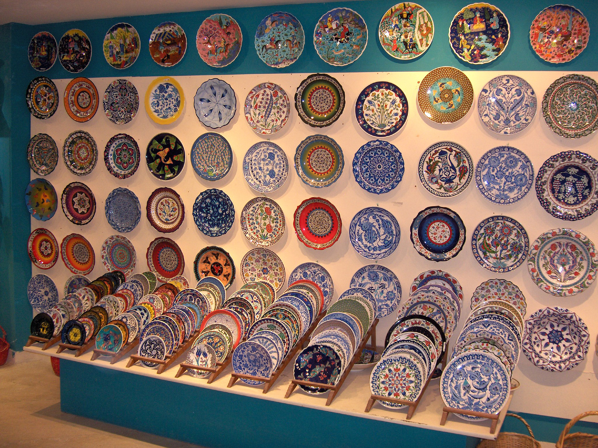 Faience; Göreme, Turkey